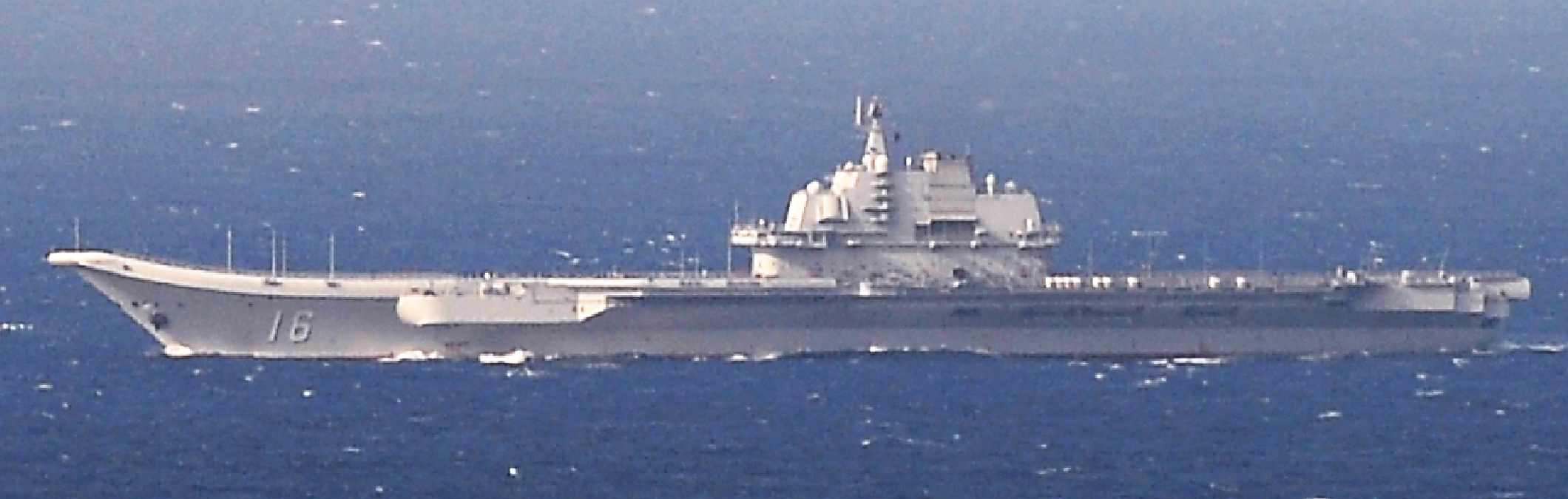 １２月２５日（日）午前１０時頃、海上自衛隊第４護衛隊所属「さみだれ」（呉）及び第５航空群所属Ｐ－３Ｃ（那覇）が、宮古島の北東約１１０ｋｍの海域を東シナ海から太平洋に向けて南東進する中国海軍クズネツォフ級空母１隻、ルーヤンⅡ級ミサイル駆逐艦２隻、ルーヤンⅢ級ミサイル駆逐艦１隻、ジャンカイⅡ級フリゲート２隻の計６隻を確認した。 なお、当該艦艇は、１２月２４日（土）に東シナ海中部の海域で確認されたものと同一である。 クズネツォフ級空母が太平洋に進出するのを確認したのは、海上自衛隊としては今回が初めてである。 また、同日午後、ジャンカイⅡ級フリゲートから哨戒ヘリコプターＺ－９（１機）が発艦し、宮古島領空の南東約１０ｋｍから３０ｋｍの空域を飛行したことを緊急発進した戦闘機等が確認した。